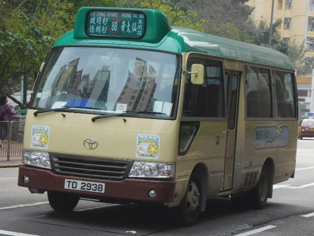 中文（香港）: 九龍專線小巴88線